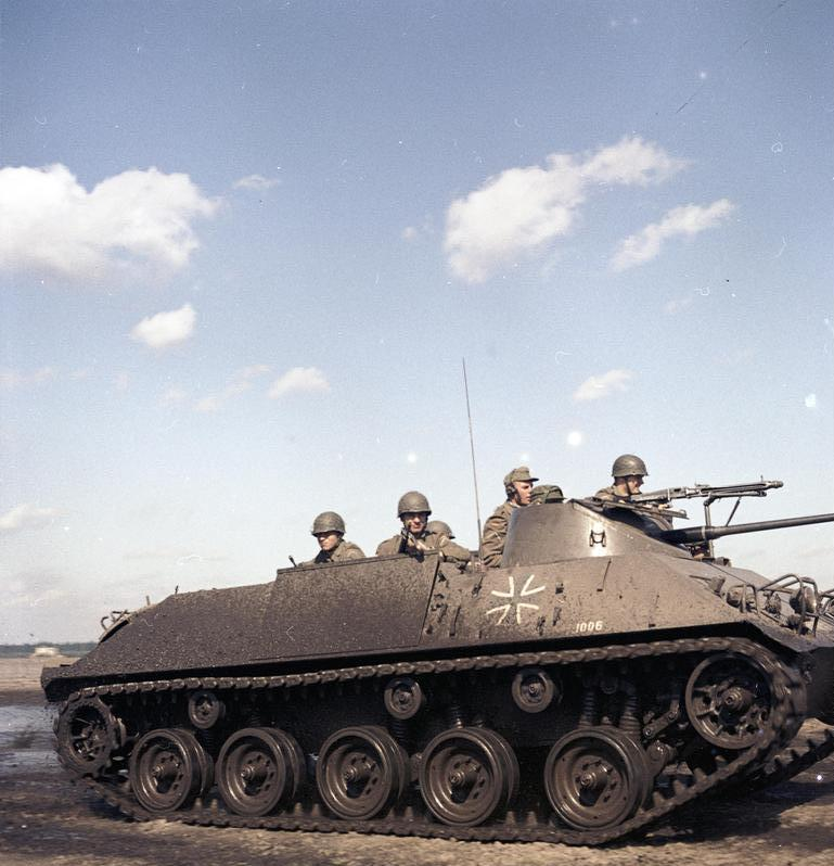 Reportage Bundeswehr Leopardpanzer, Munsterlager, KTrS III [Munsterlager, Truppenübungsplatz in der Lüneburger Heide]